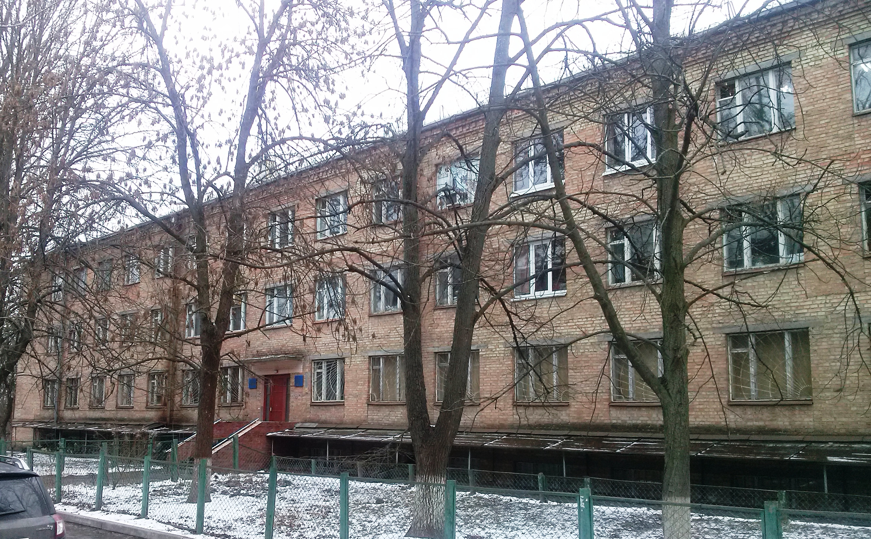 Здание Центральной геофизической обсерватории имени Бориса Срезневского, Киев, проспект науки, 39 корпус 2